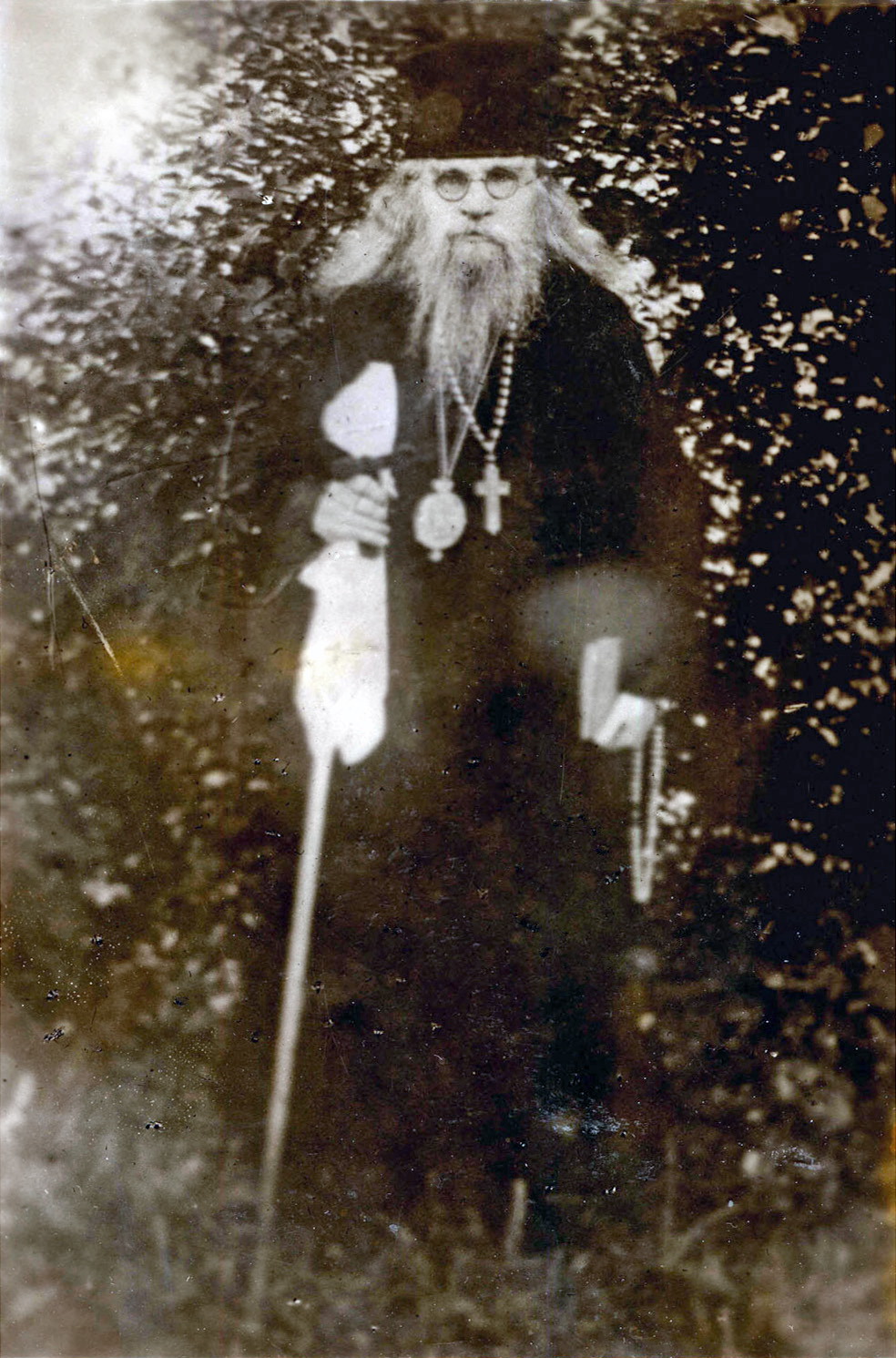 Епископ Нарвский Сергий (Дружинин). Фотография из следственного дела. 1937 год.